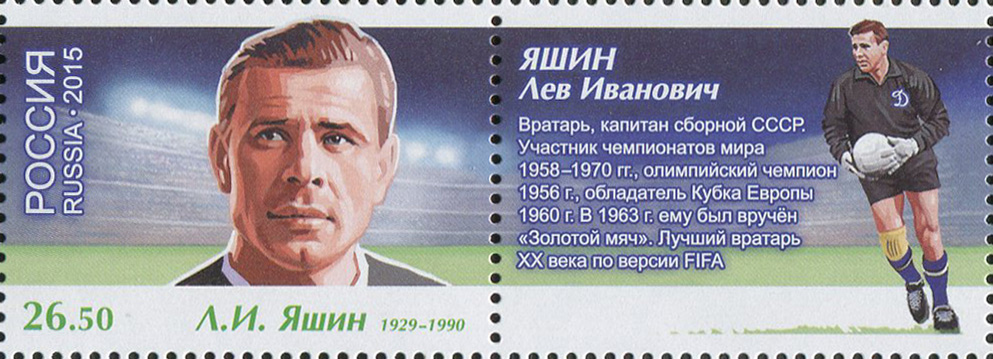 Чемпионат мира по футболу FIFA 2018 в России. Легенды футбола.Л.И. Яшин (1929-1990)